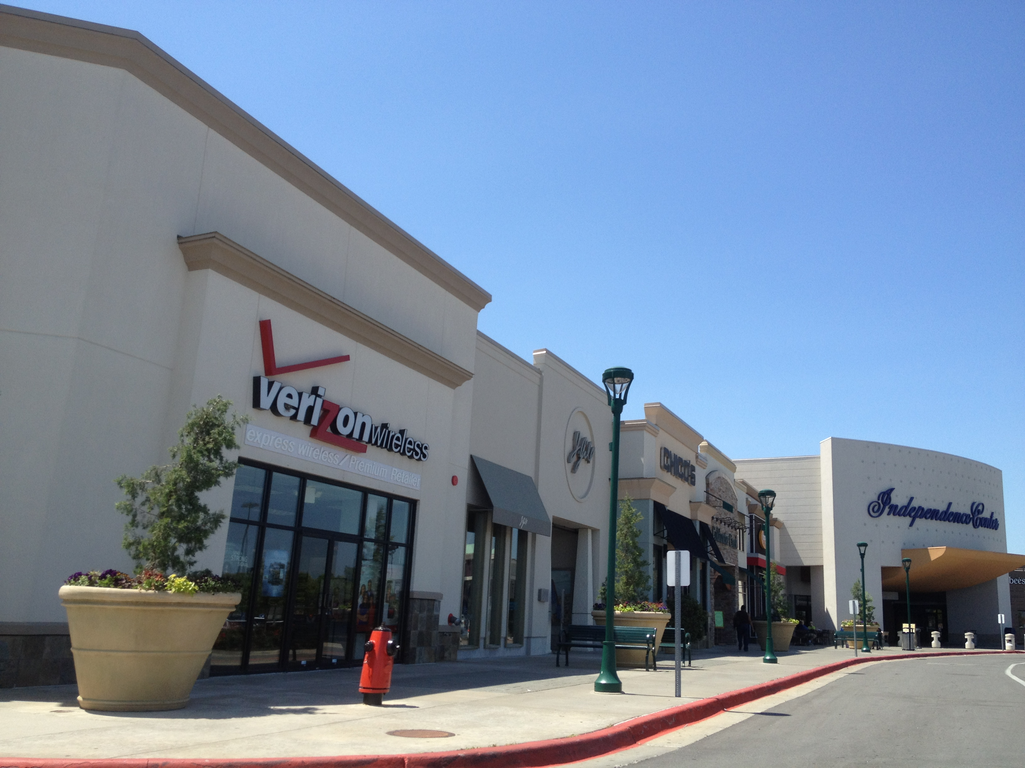 Independence Center